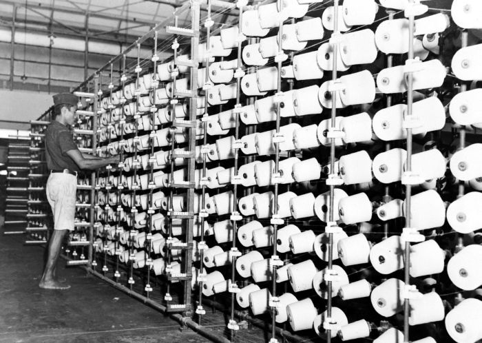 Repronegatief. Controle van de spoelen in het magazijn van de Java Textiel Maatschappij te Tegal